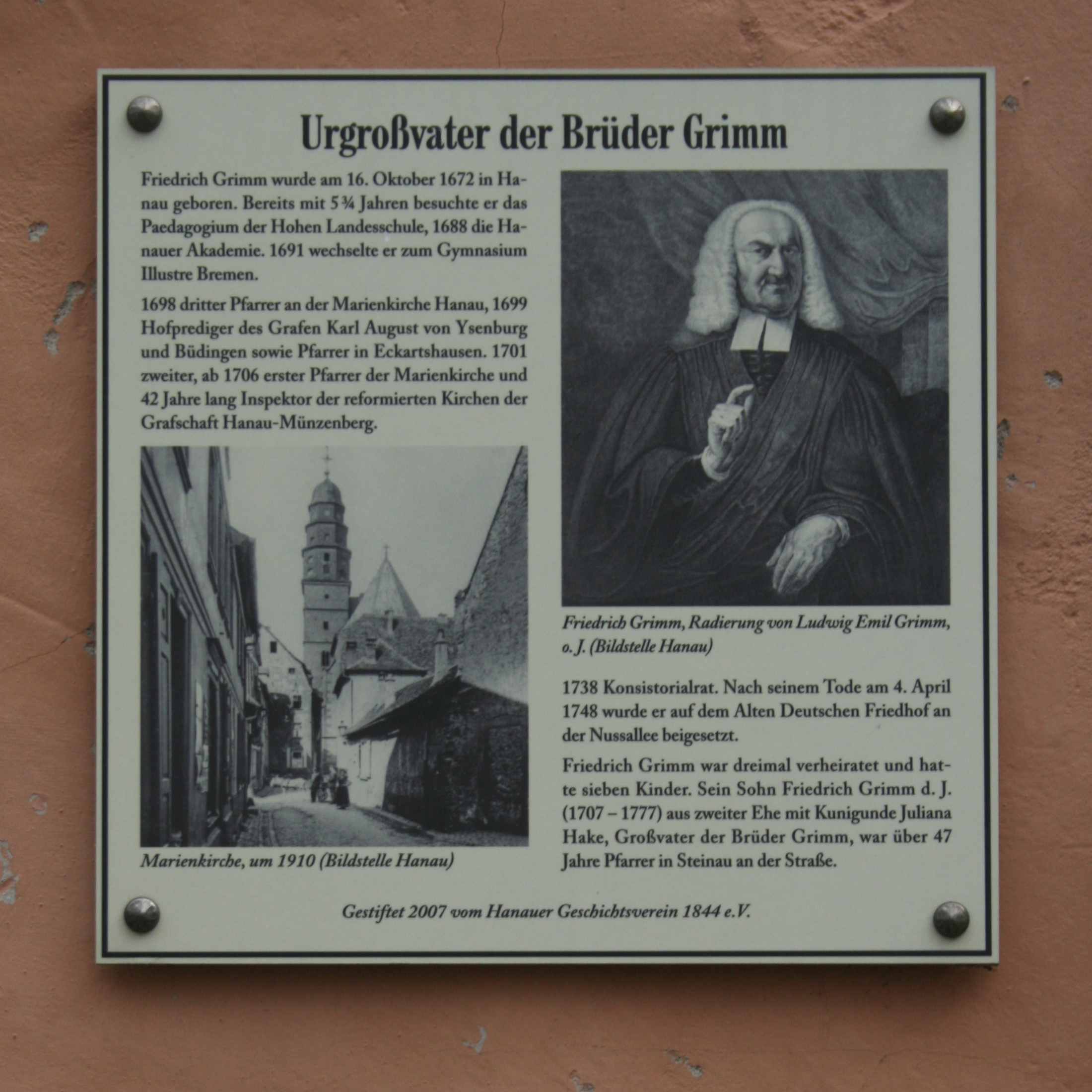 Tafel für Friedrich Grimm, Urgroßvater der Brüder Grimm und reformierter Kircheninspektor an der Marienkirche in Hanau. Gestiftet 2007 vom Hanauer Geschichtsverein 1844 e.V. (öffentlich zugänglich, Panoramafreiheit).